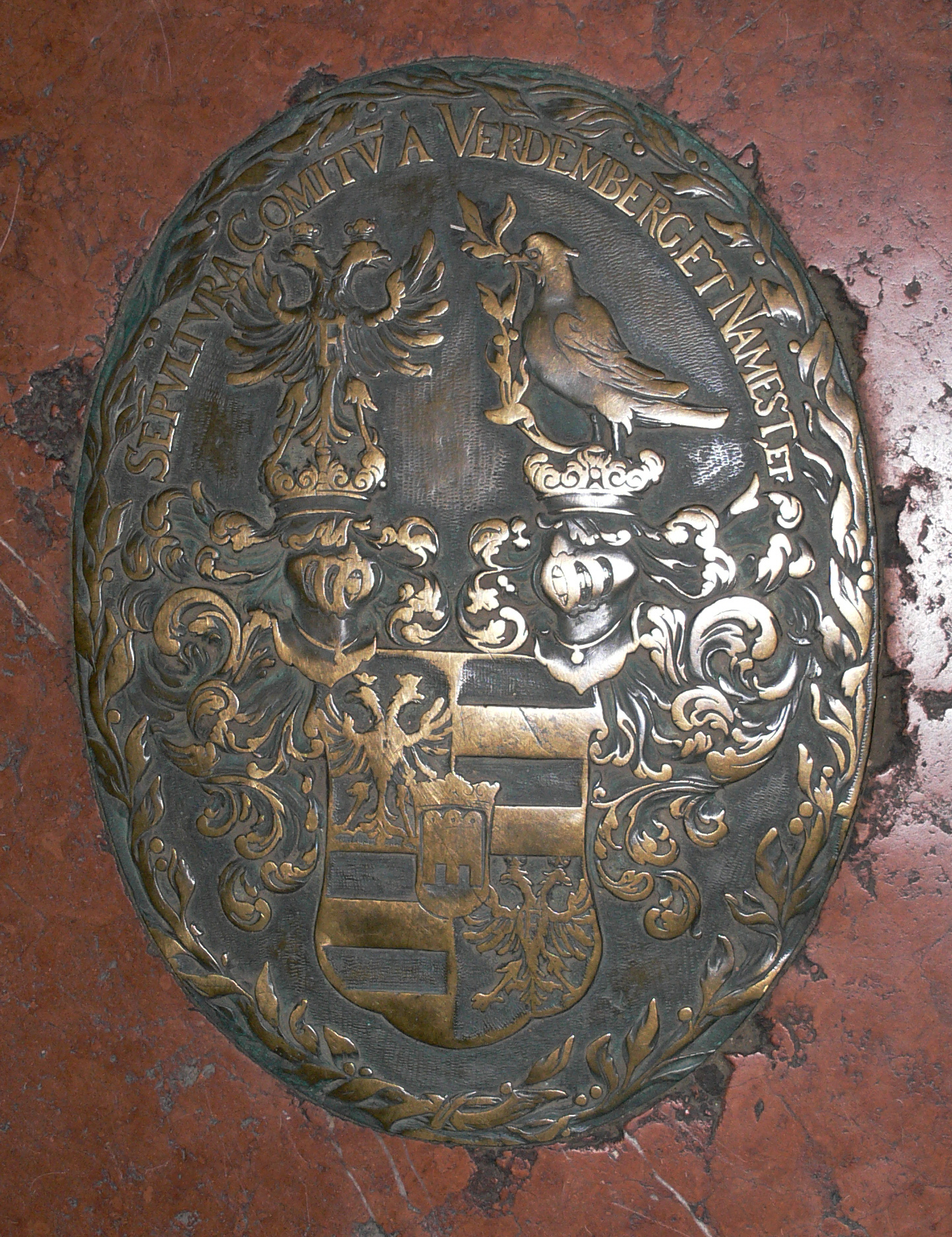 Wien, Michaelerkirche, Werdenbergkapelle, Gruftplatte der Familie Werdenberg-Names, mit Wappen, 1730